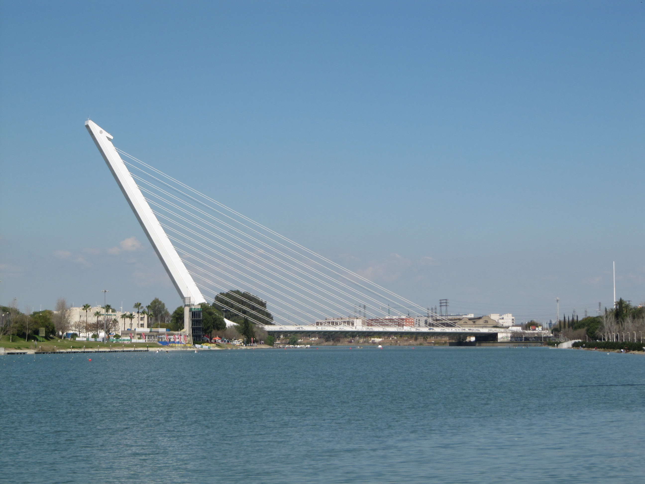 Category:Puente del Alamillo - March 2011